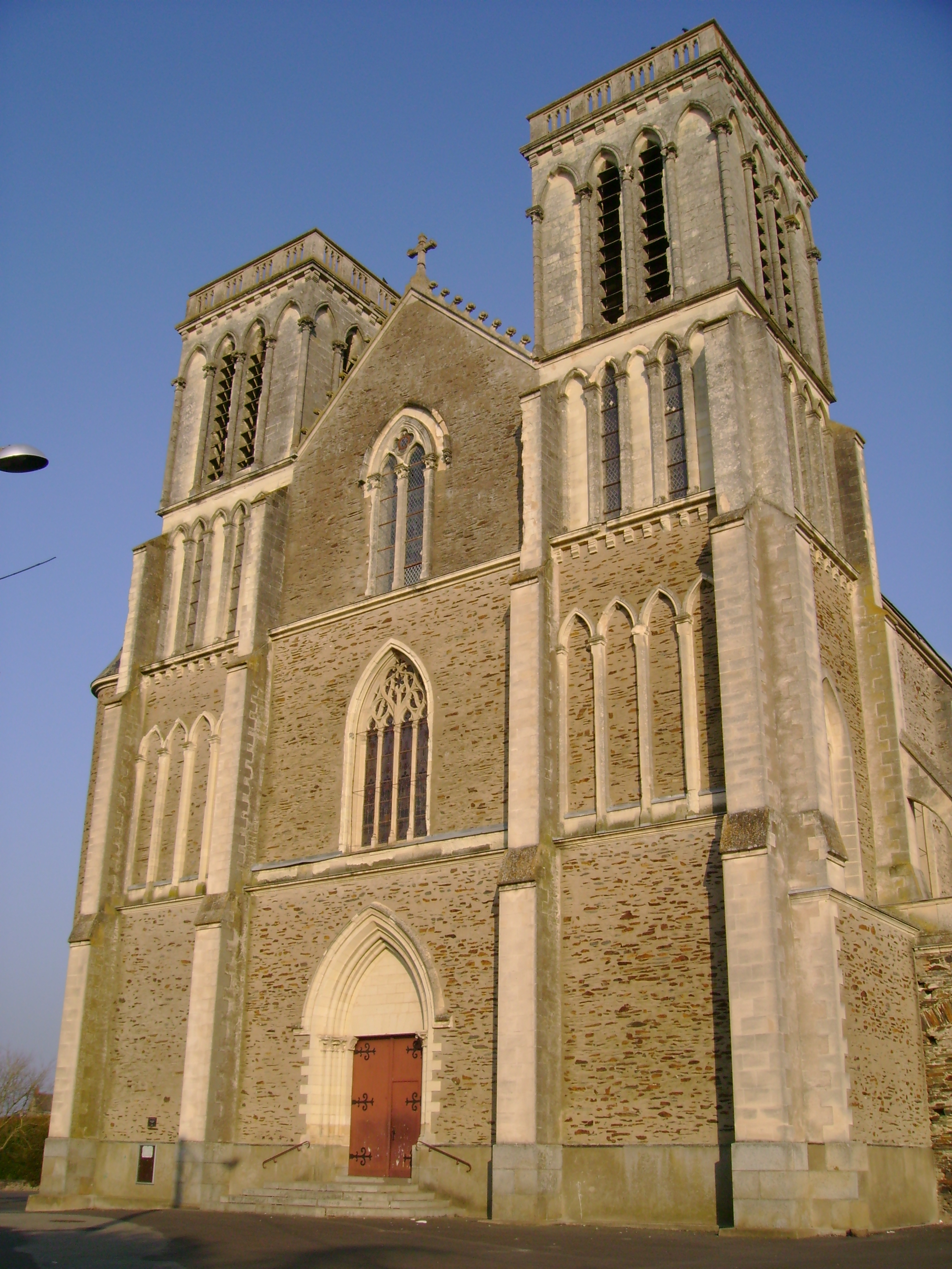 Portail de l'église Saint-Denis de Candé, 49, France